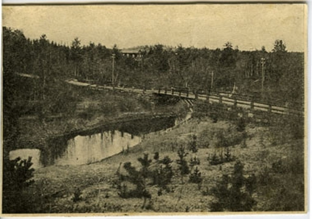 Otsanlahti, 1900-1939 гг.